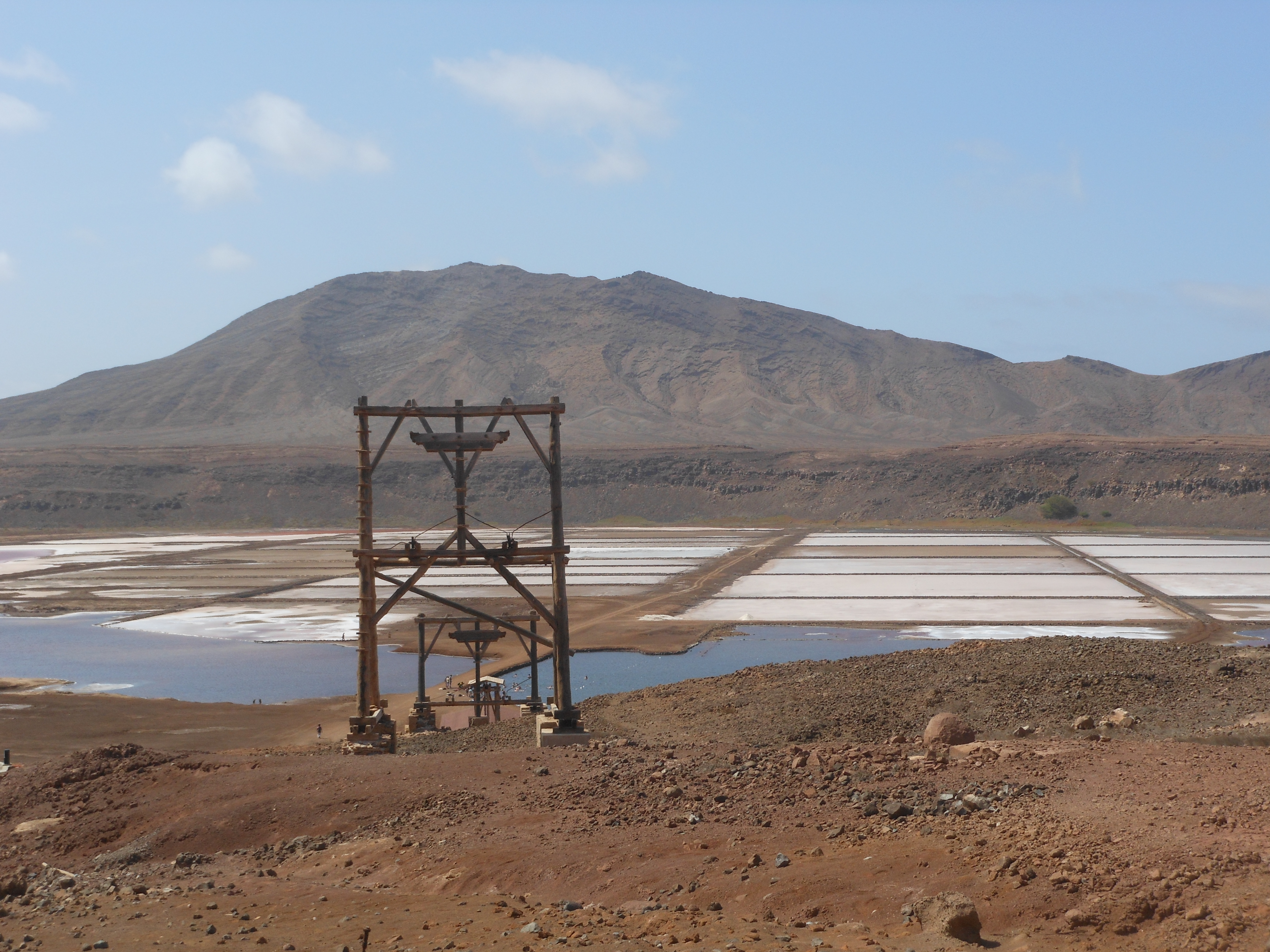 Kapverdy, produkcia prírodnej morskej soli.